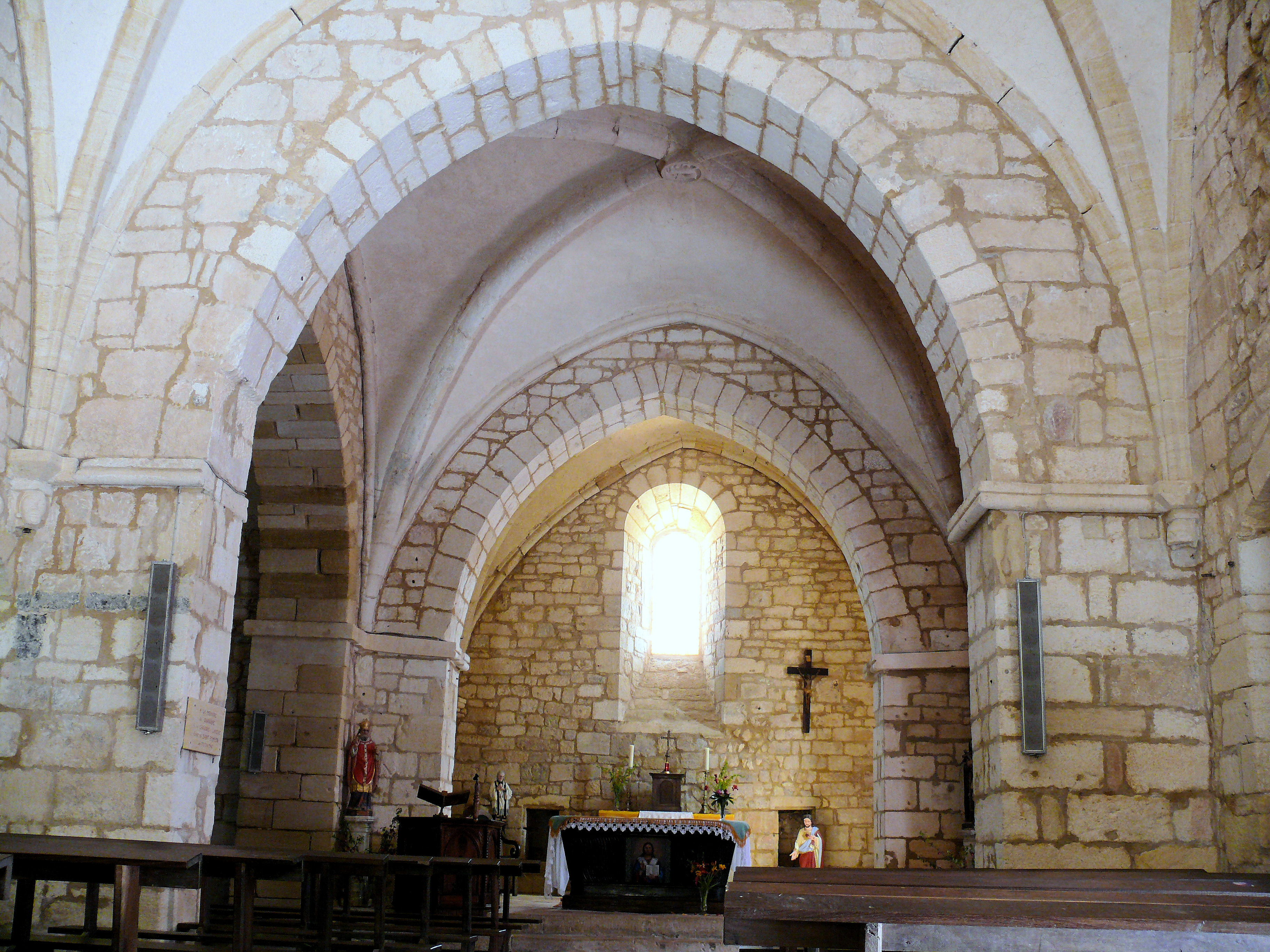 Saint-Pompont - Église Saint-Jean-Baptiste - Nef, croisée du transept et choeur